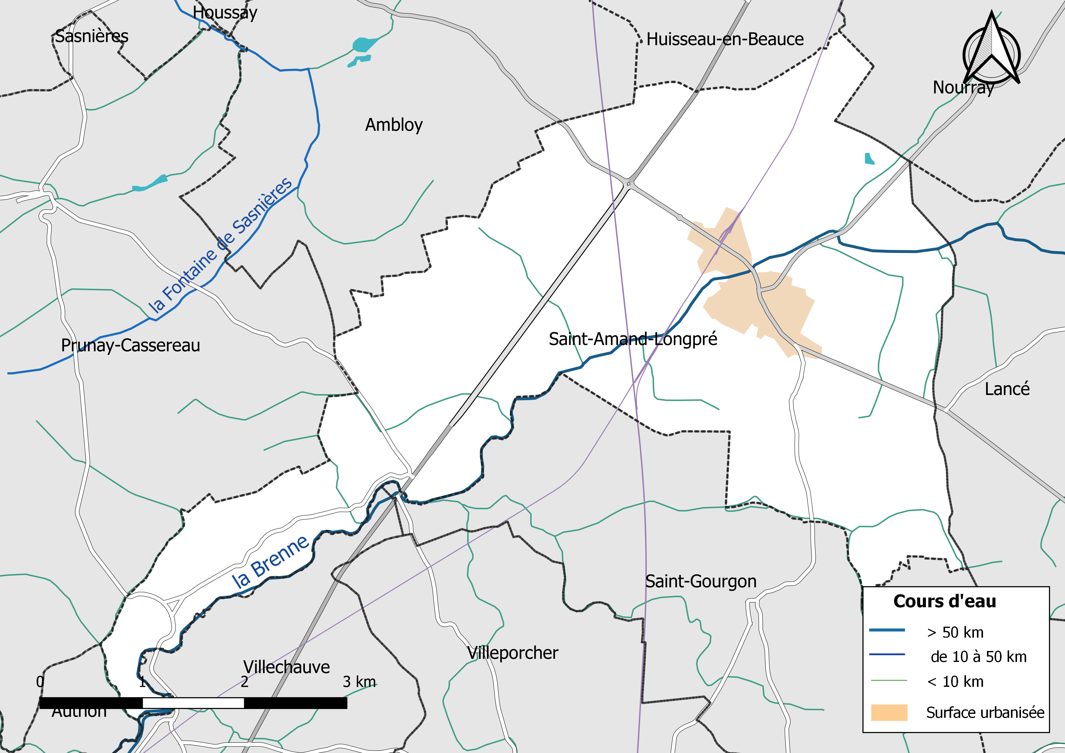 Carte du réseau hydrographique de la commune de Saint-Amand-Longpré (Loir-et-Cher, France).